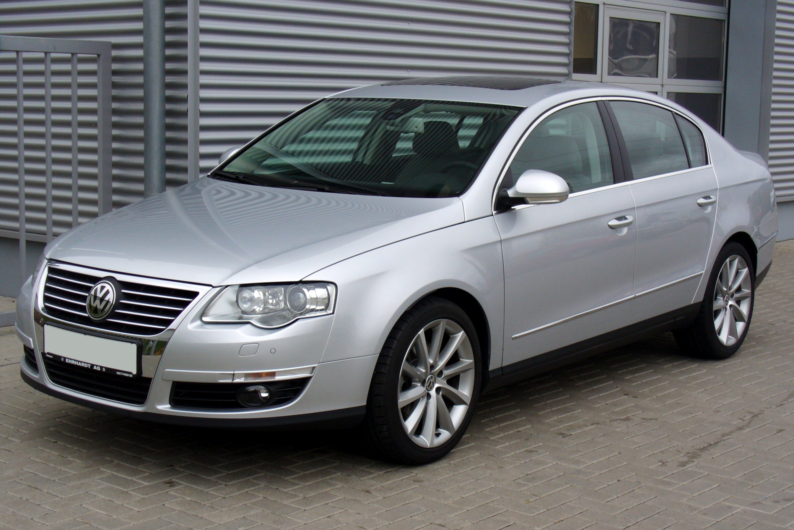 VW Passat B6 Limousine